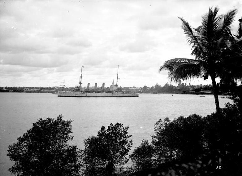 Blick auf Daressalam, im Vordergrund engl. Kreuzer